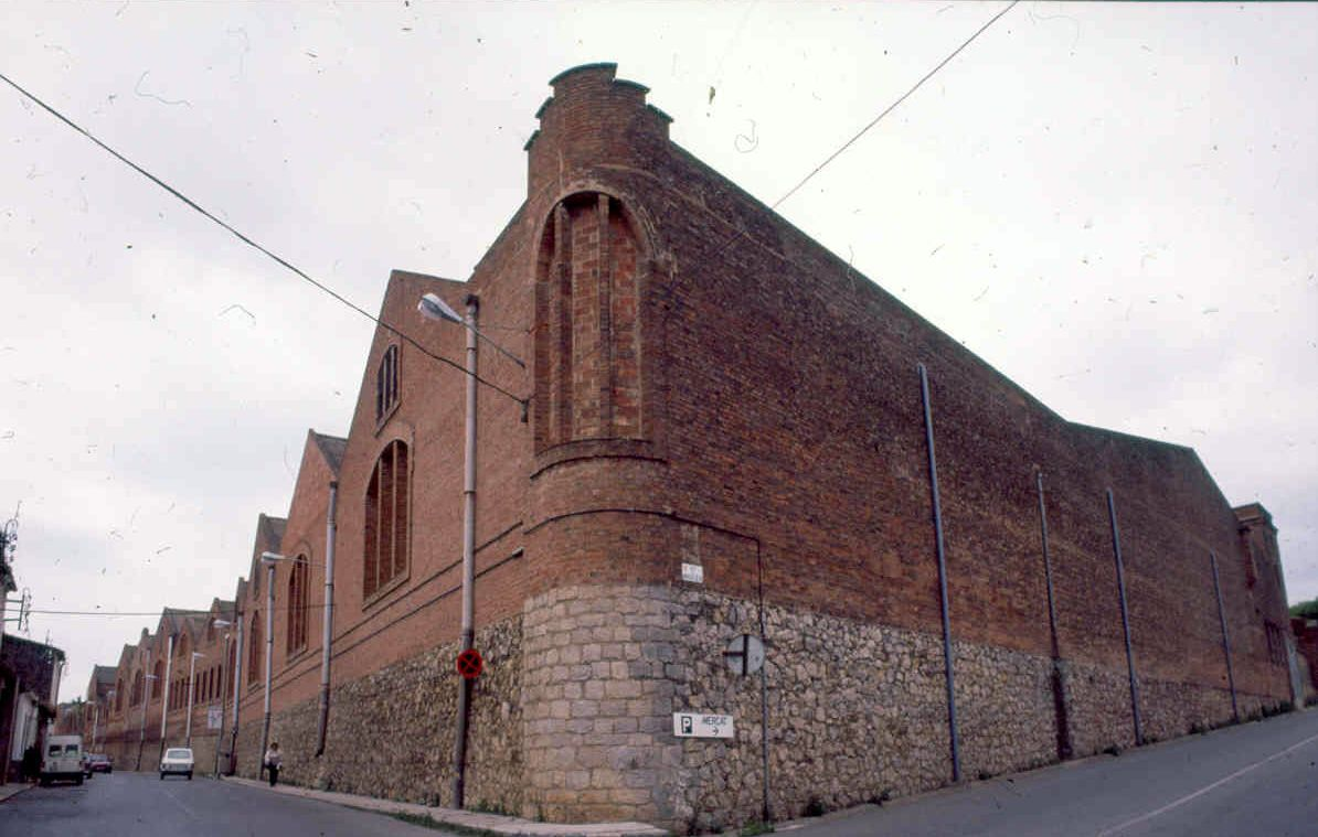 Vista exterior de la Bòbila Nova (1992). Arxiu d'imatges Museu del Suro